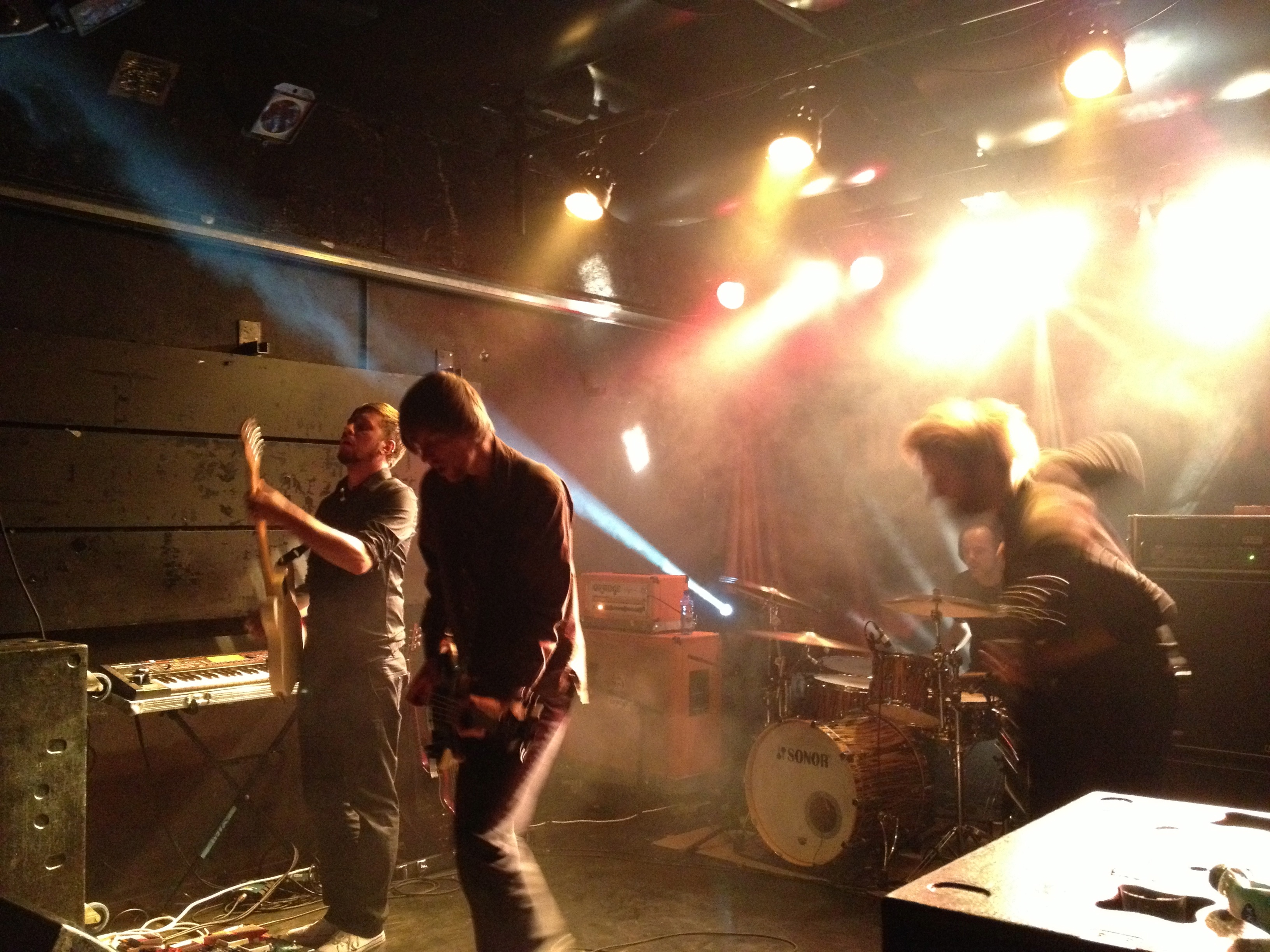 Tides From Nebula à Kalvingrad - L'Usine, Genève, le 7 novembre 2012